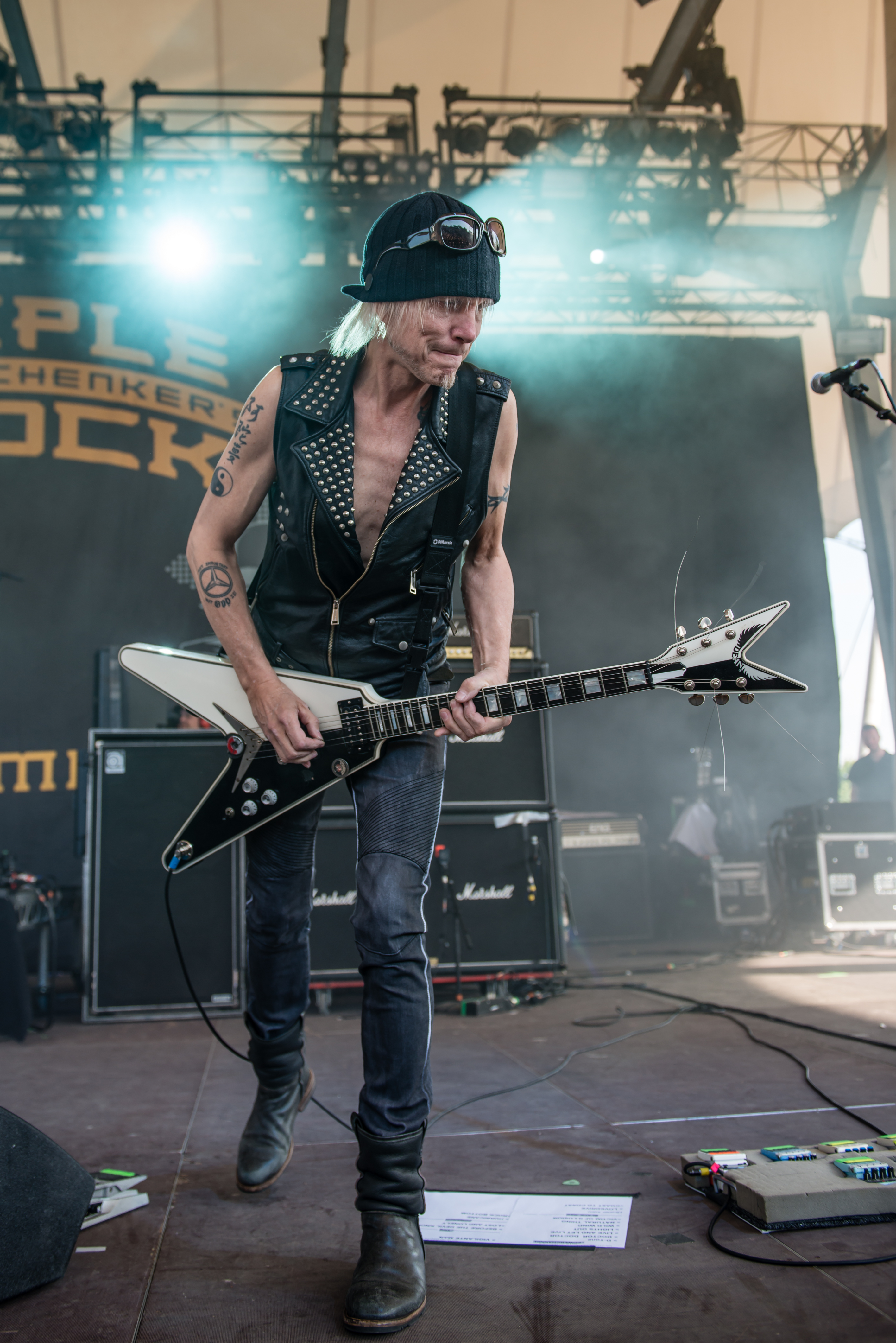 'Rock Hard Festival 2015; Gelsenkirchen Amphitheater': ' Michael Schenker's Temple of Rock'